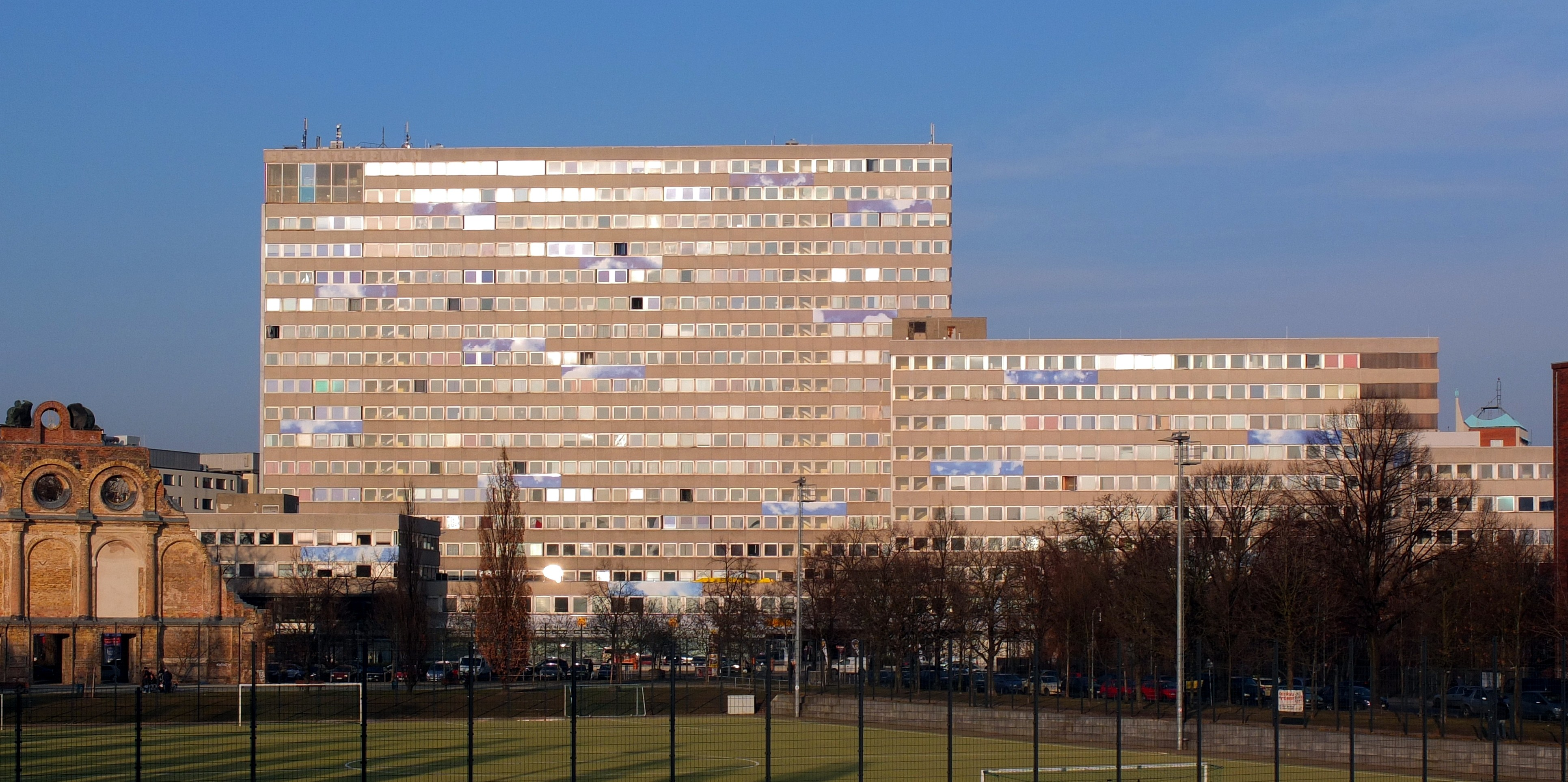 Hochhaus Stresemannstraße 74/76 in Berlin-Kreuzberg.